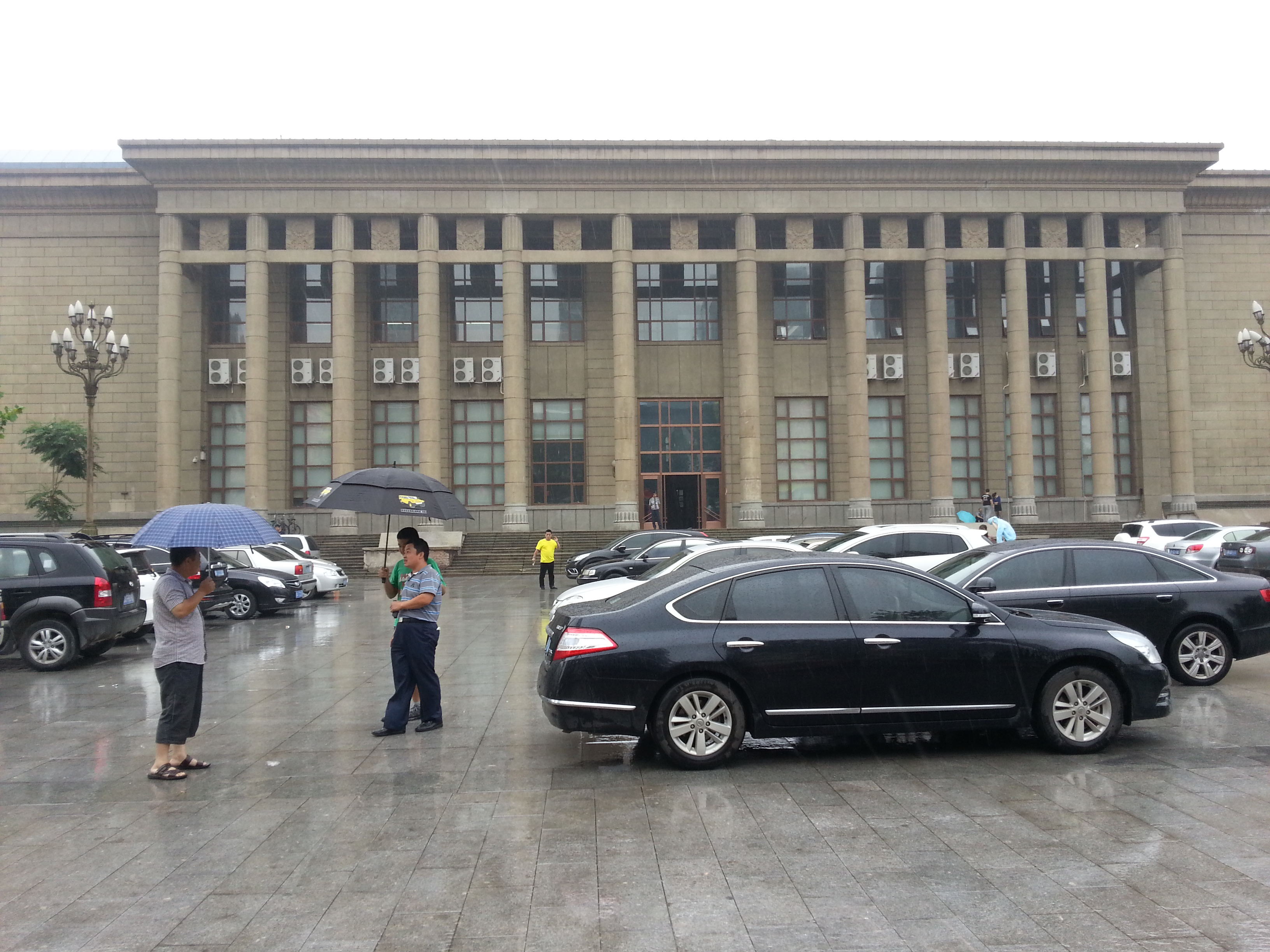 博物馆